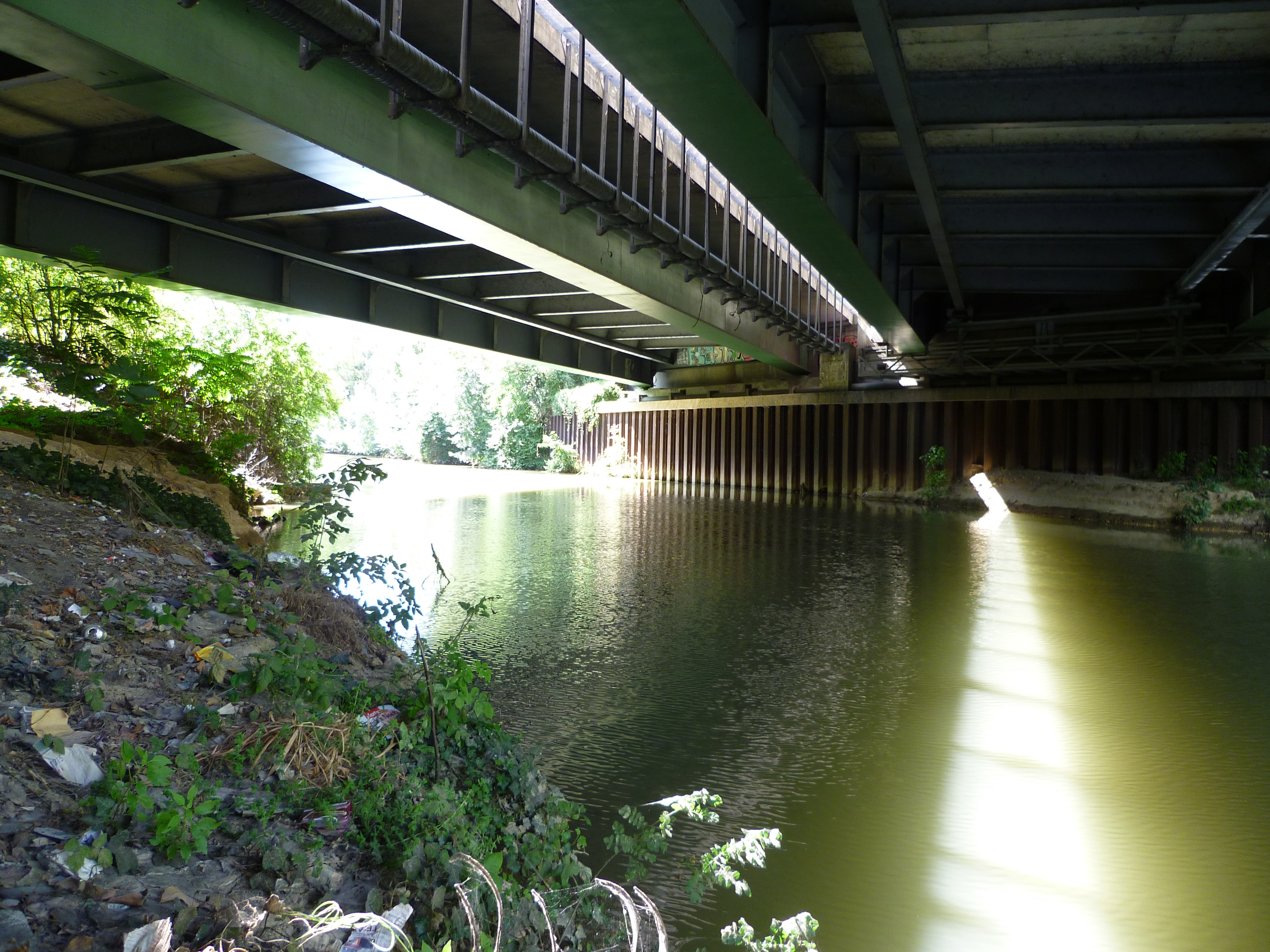 L'A624 traversant le Touch à Toulouse (Haute-Garonne, France).